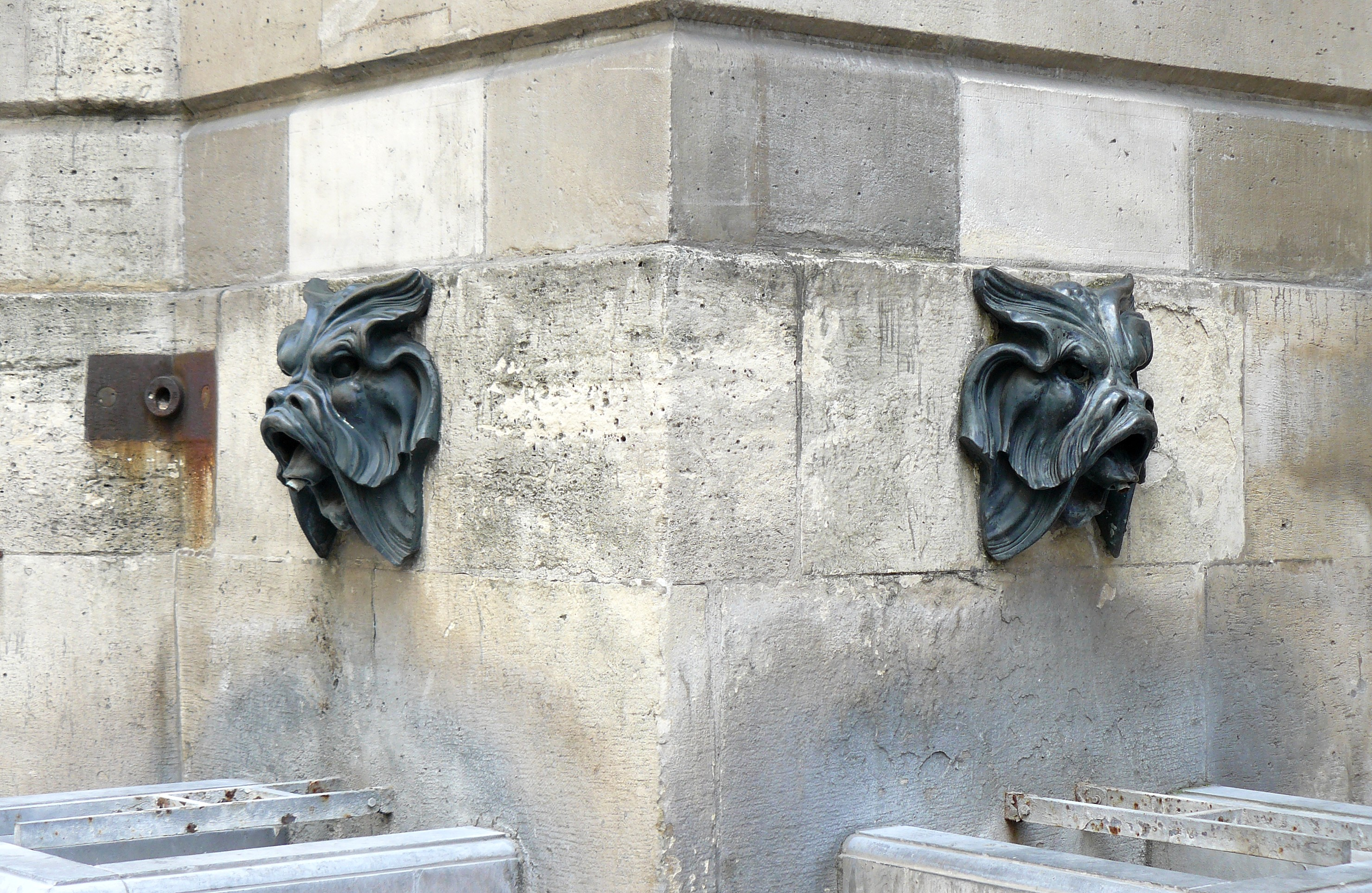 Fontaine des Quatre-Saisons - Edmé Bouchardon - Paris 7ème - 1745 - Mascaron de bronze